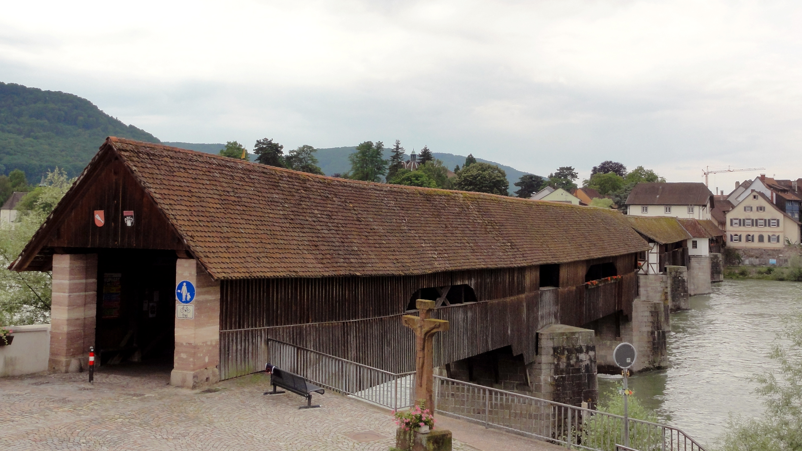 Holzbrücke über den Rhein Bad Säckingen ↔ Stein AG, Schweizer Seite. Info GPS data may be inaccurate. EXIF data regarding date and time may be inaccurate.